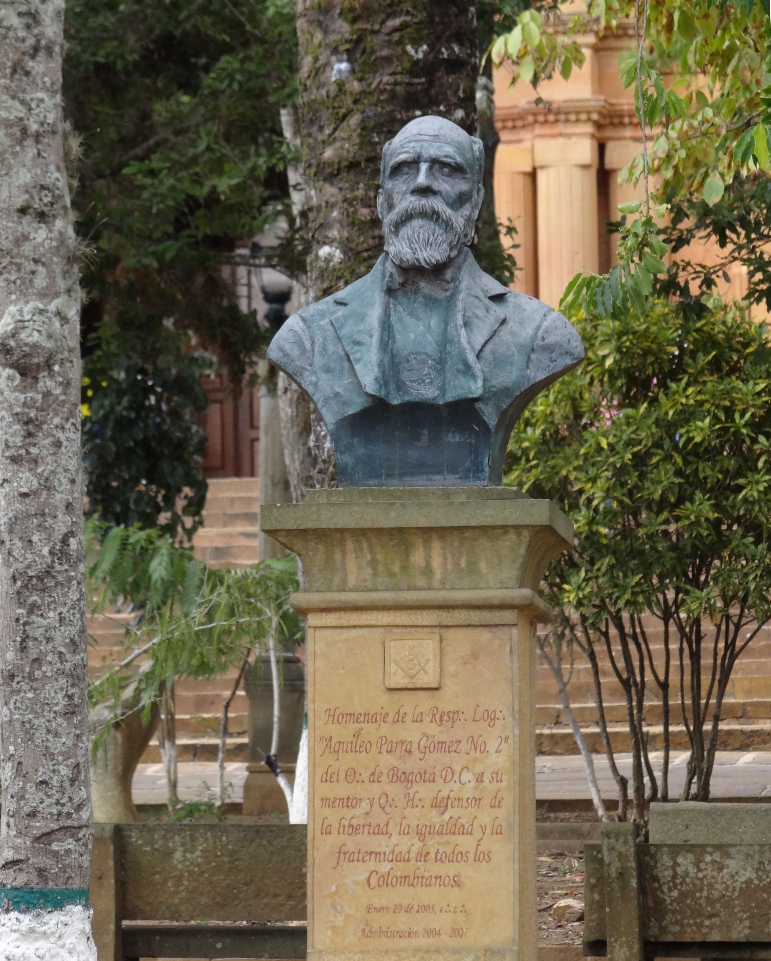 Busto de Aquileo Parra Gómez en el parque principal del Municipio de Barichara, departamento de Santander, Colombia.